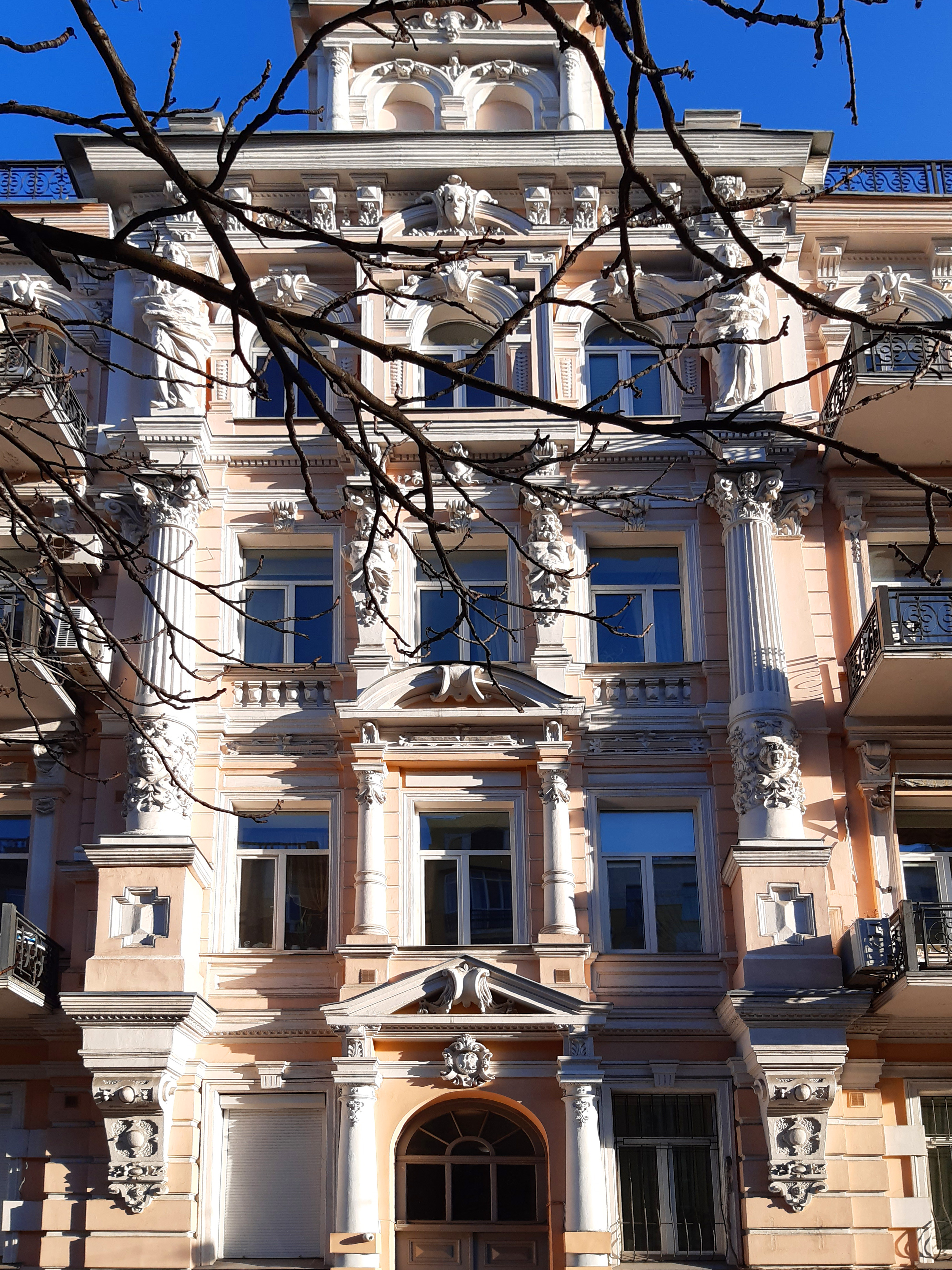 Садиба на Антоновича, Київ, вул. Антоновича, 23